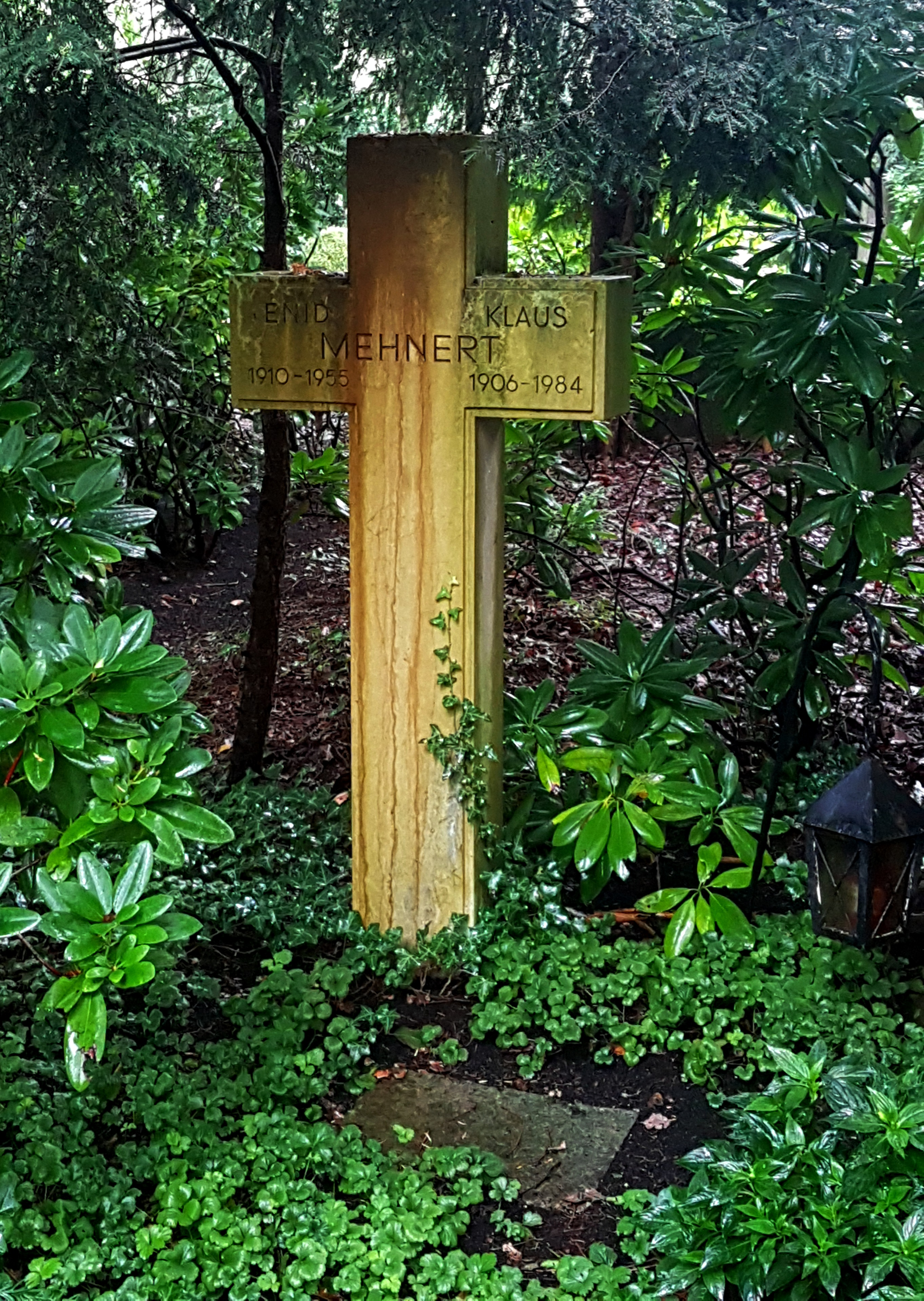 Grabstätte Klaus Mehnerts auf dem Stuttgarter Waldfriedhof.